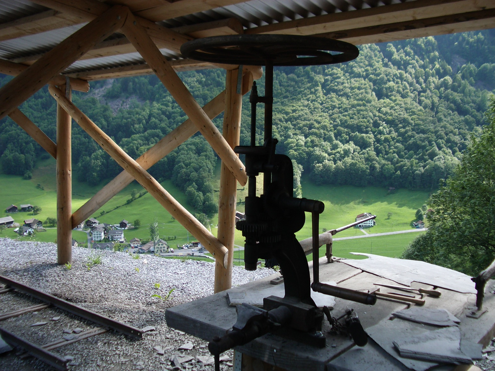 Engi GL, Switzerland self-made, June 2006